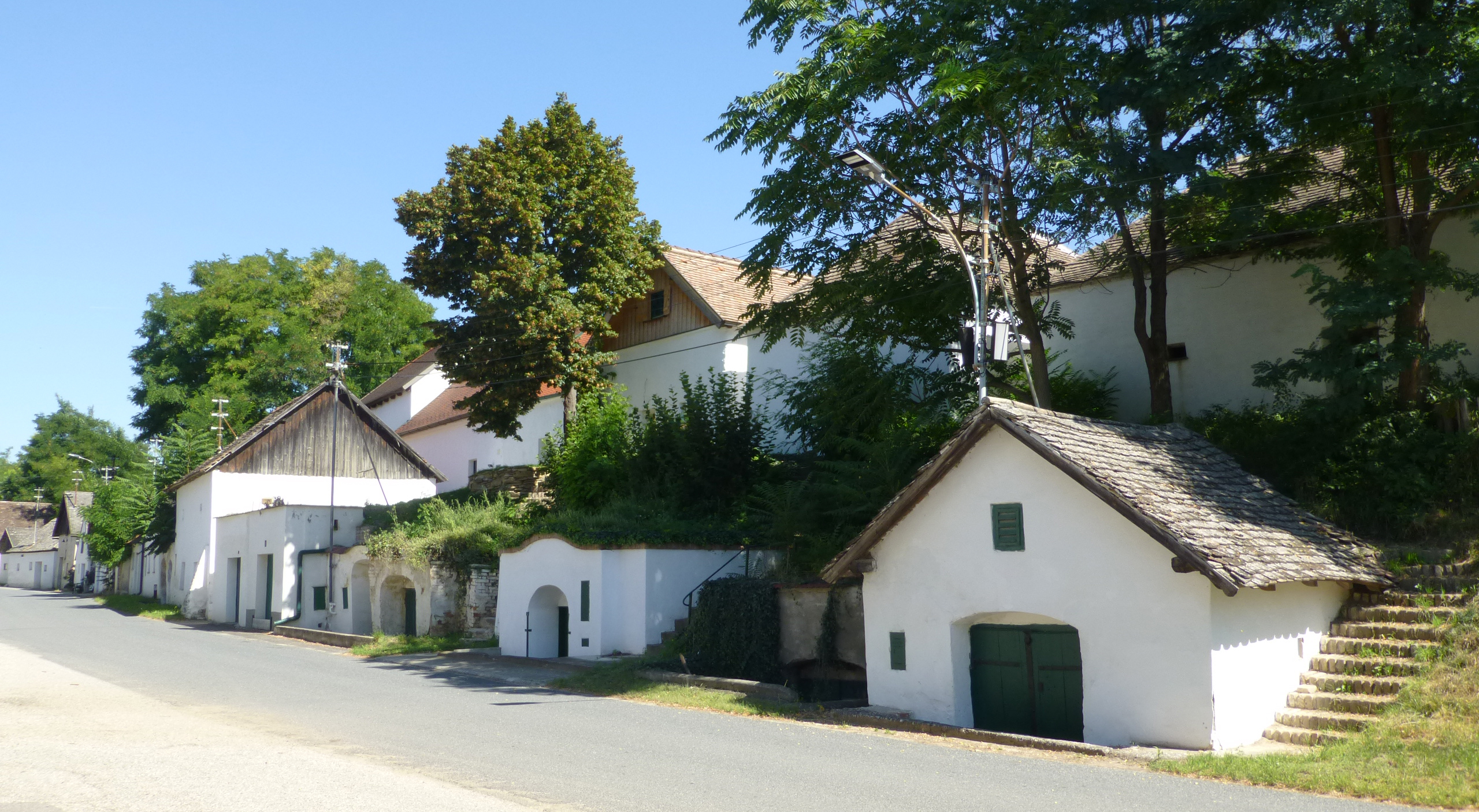 Caves à vin dans la Kellergasse de Hadres, Weinviertel, Basse-Autriche.